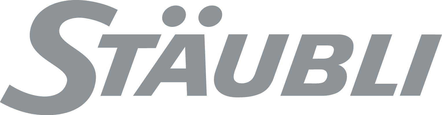 Staubli logo